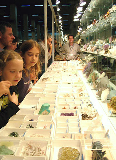 EXPOMINER - Nuevos aficionados